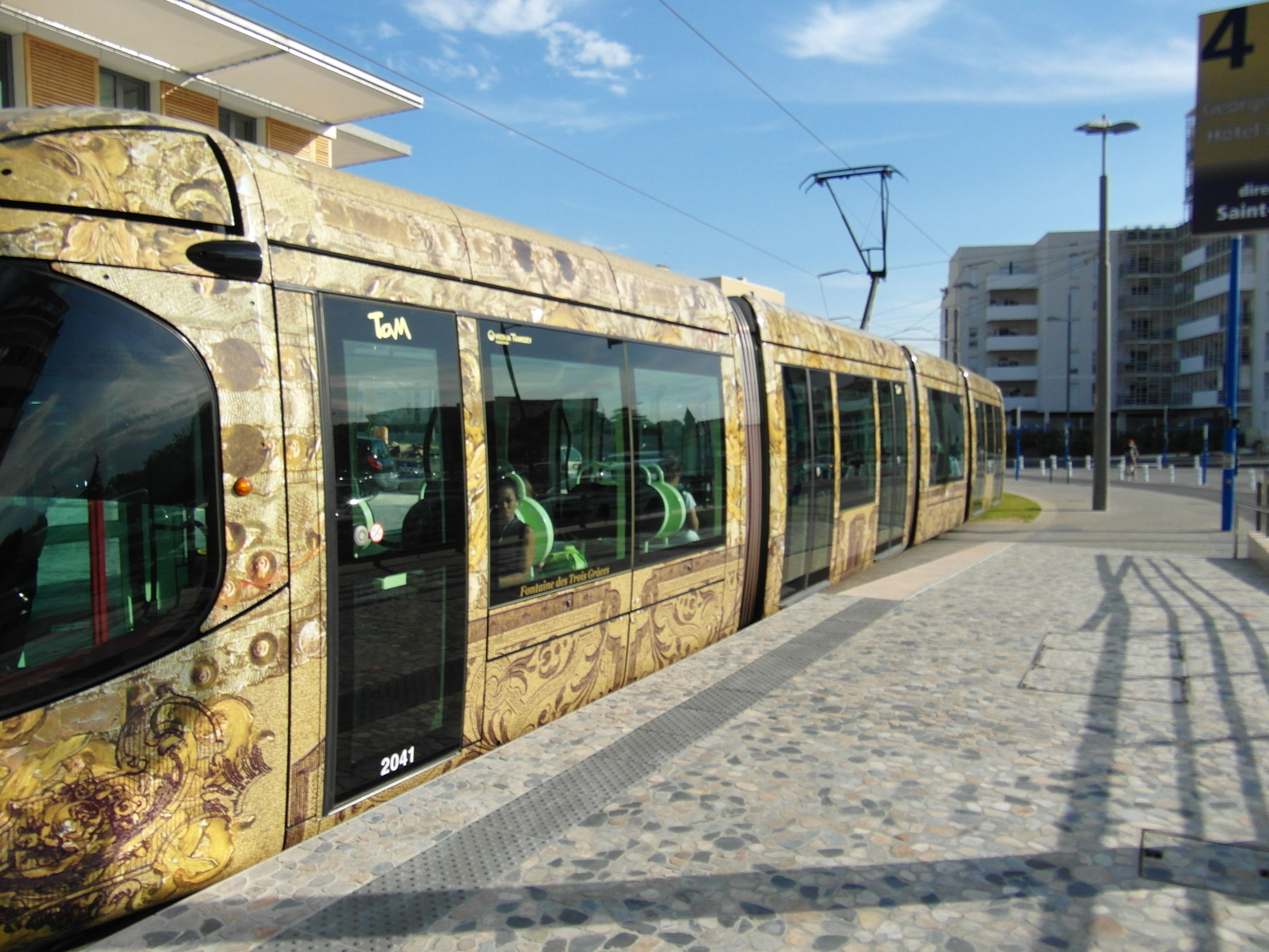 Details der Straßenbahnfahrzeuge der Linie 4